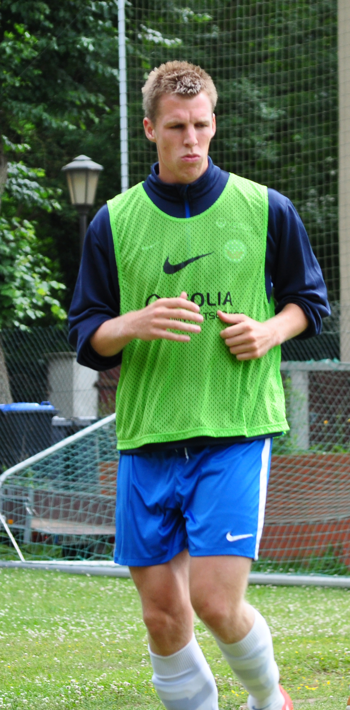 Johan Plat